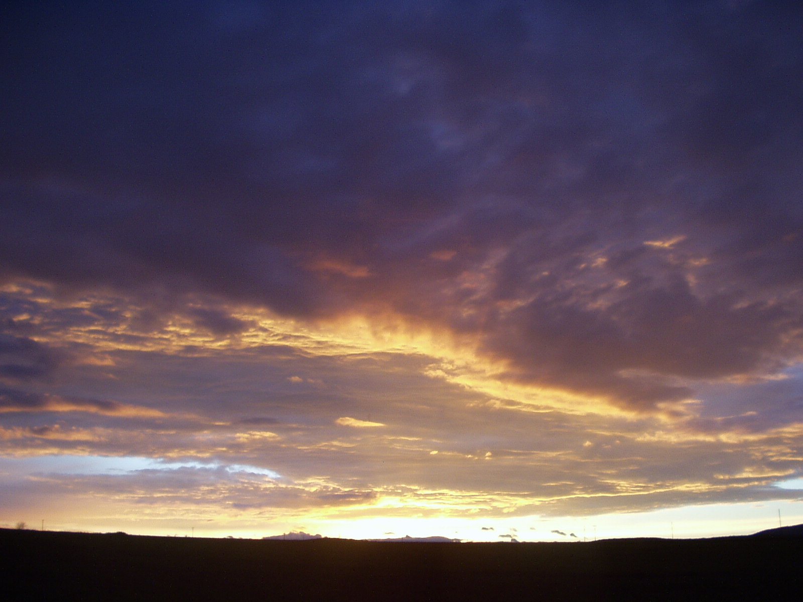 Oblaky stratocumulus opactus pri západe Slnka (sunset) Autor fotografie: Jana Plauchová